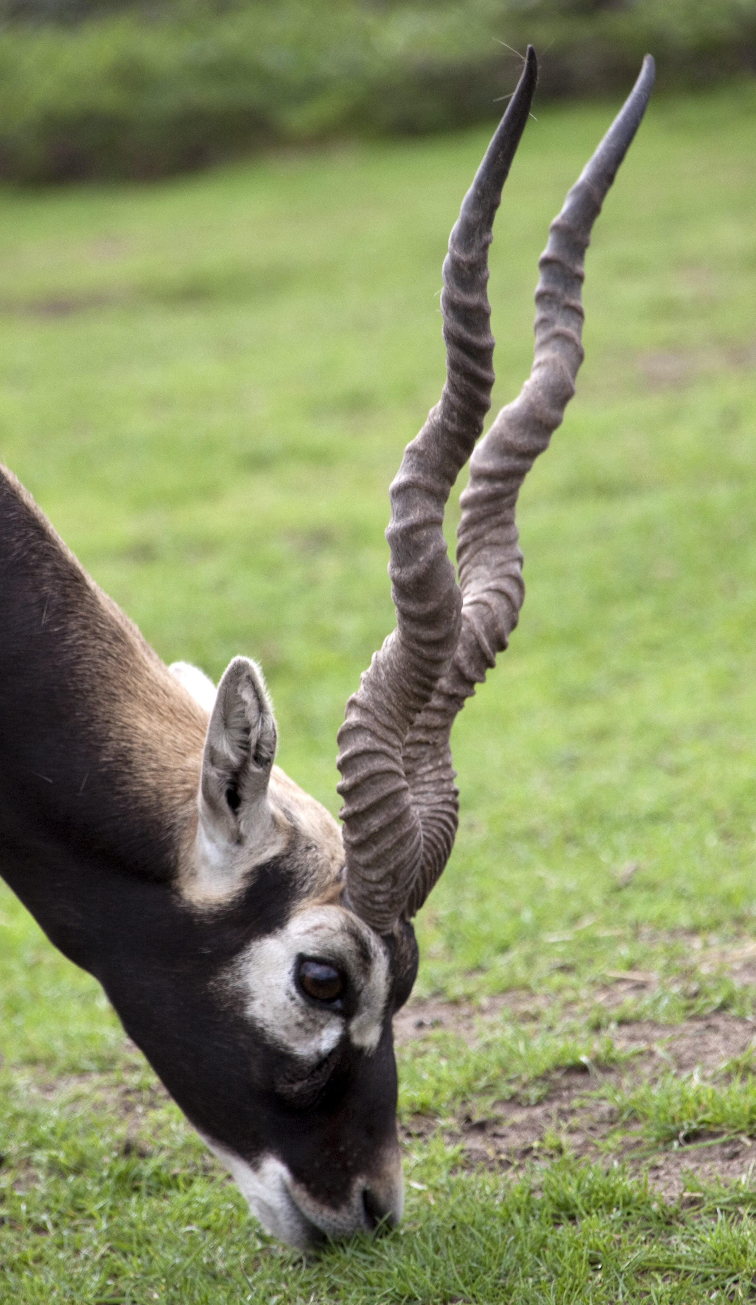 Blackbuck 1